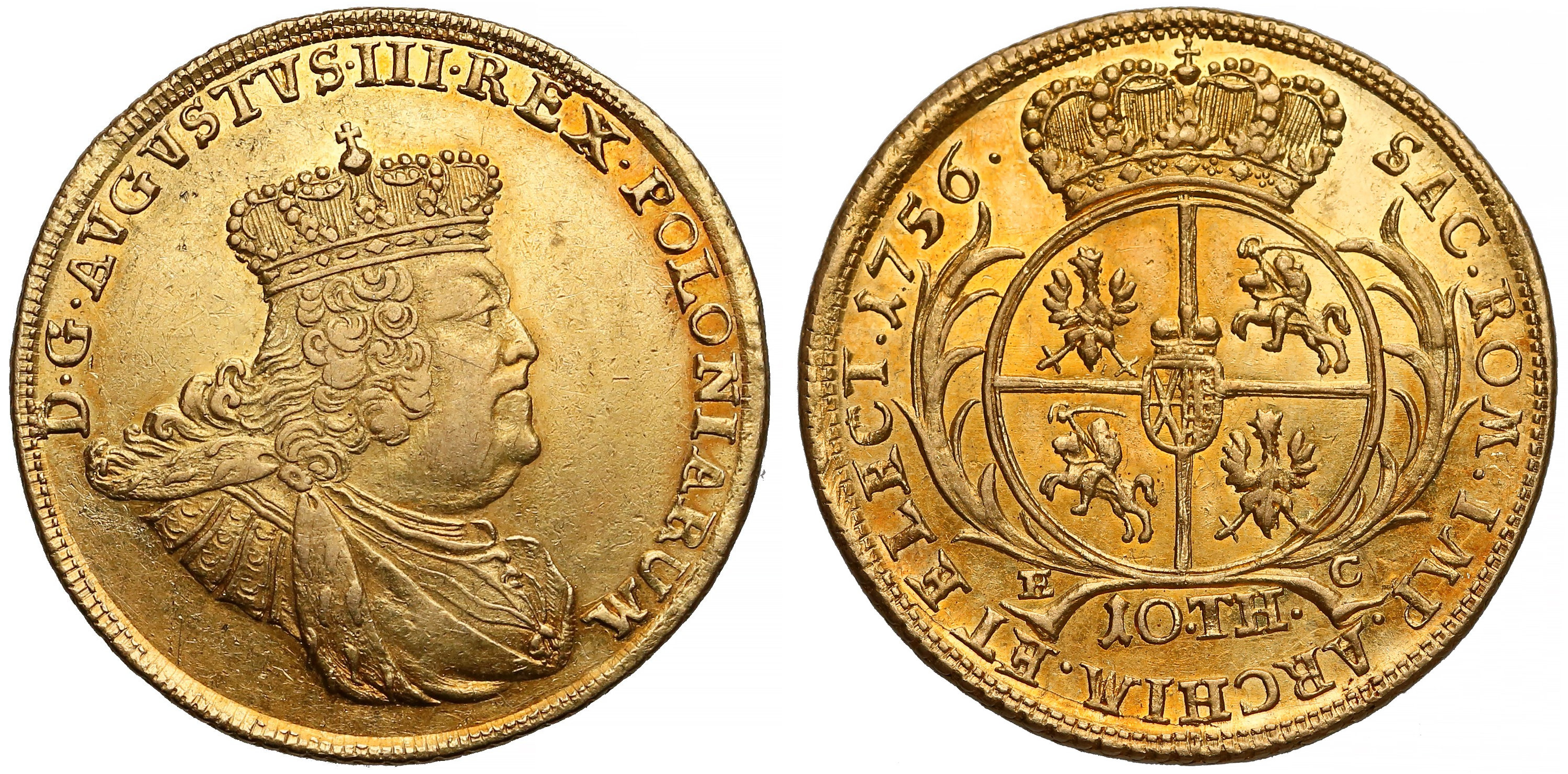 10 dukatów 1756